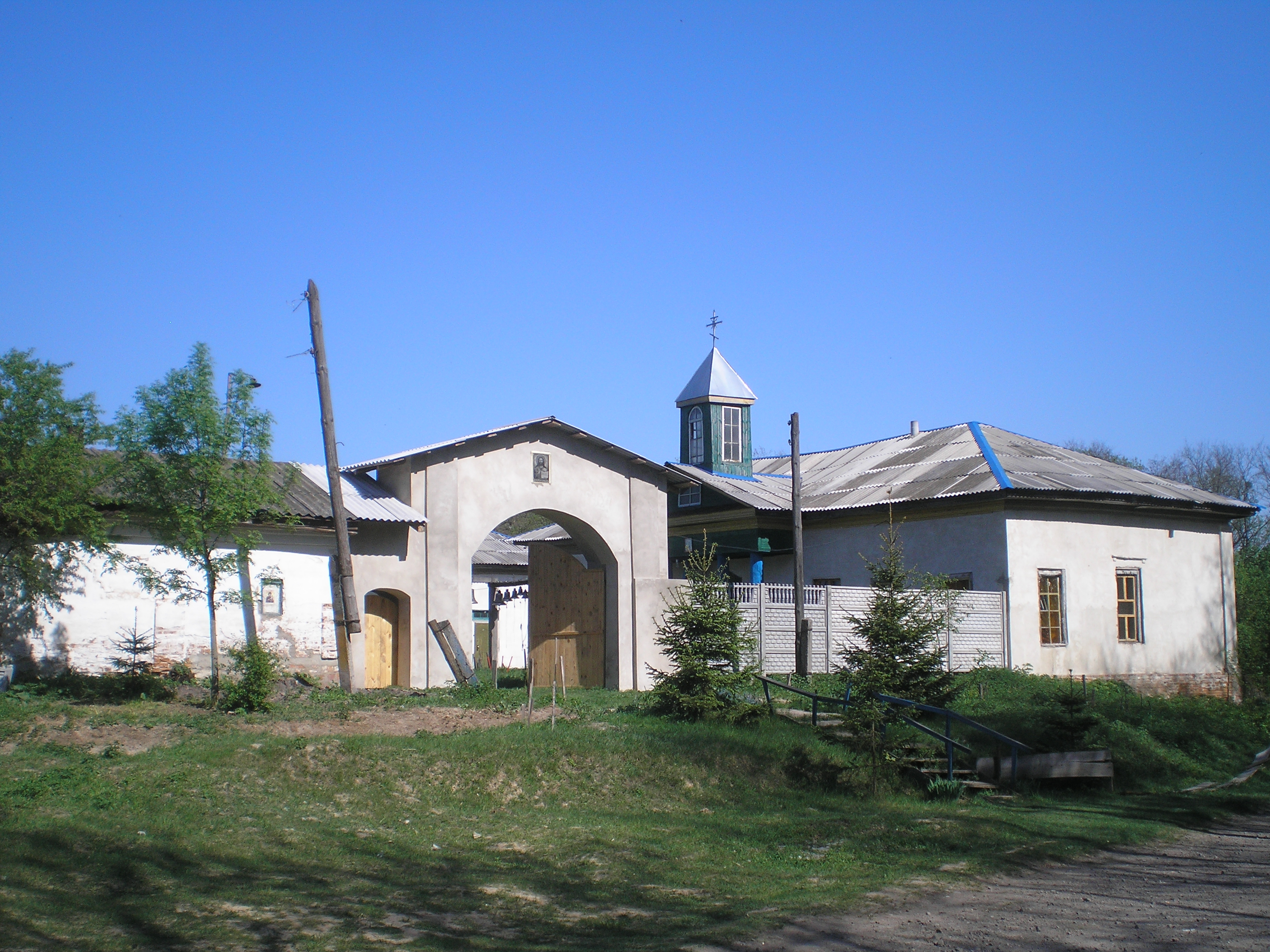 Сучасний вигляд Рихлівського монастиря